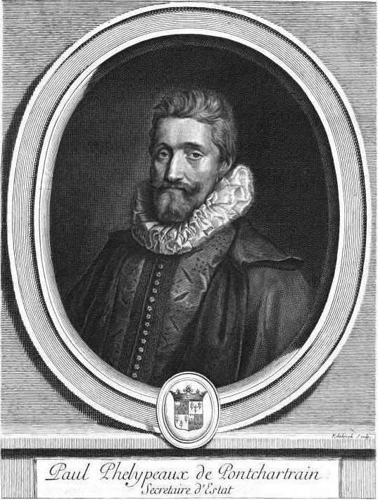 Portrait of Paul Phélypeaux de Pontchartrain, secrétaire d'État.""